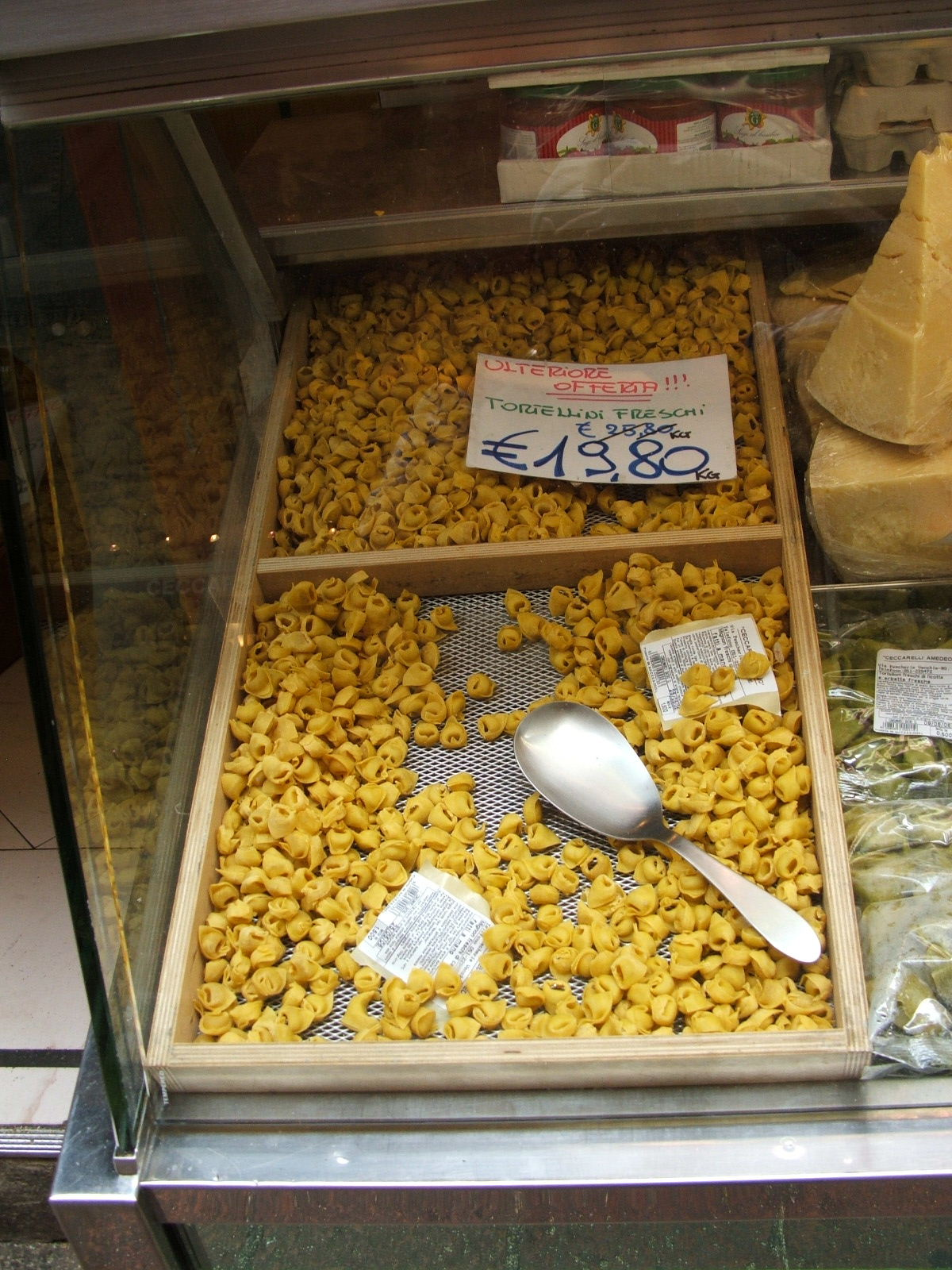 Dal wikiraduno di Bologna, maggio 2006 Bologna - Tortellini in un negozio di pasta fresca